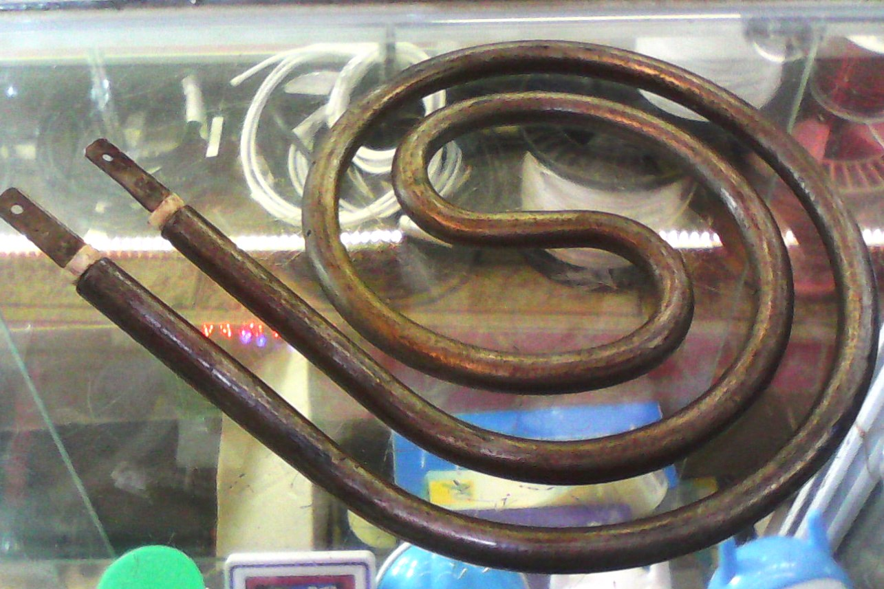 Трубчатый электронагреватель (ТЭН) электроплиты спиральный двухконцевыми выводами. Регулирование мощности реостатное на переключателе.